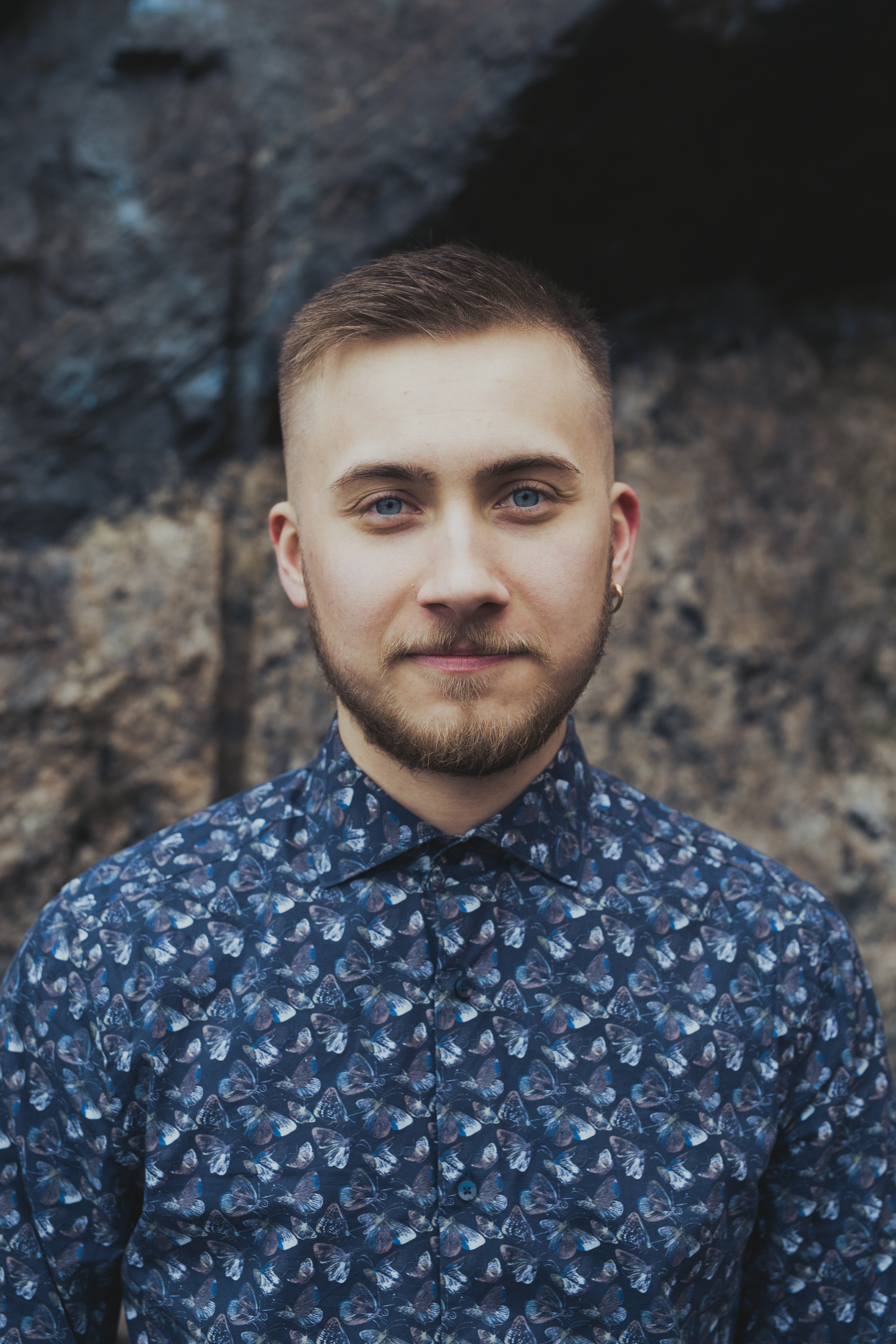 Jerker Hans-Ers